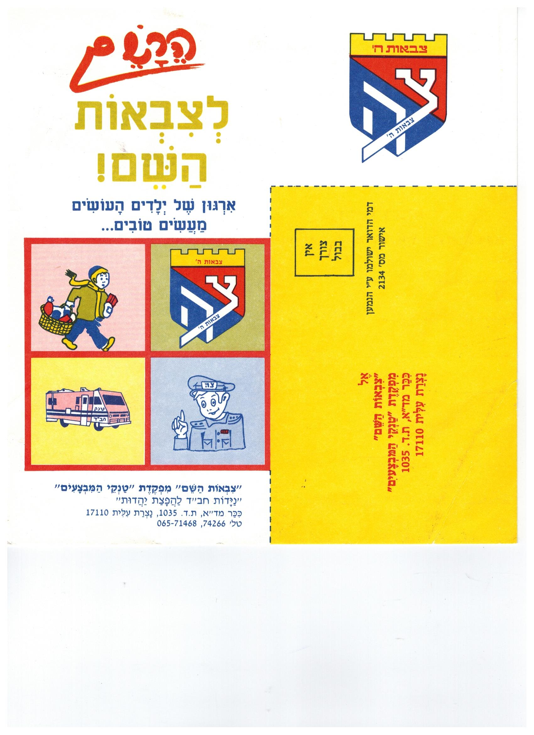 כרטיס רישום לארגון צבאות השם מס 2 צד ב